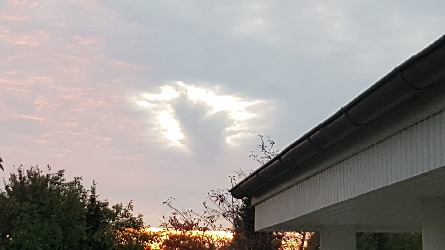 gesehen über dem Kreis Minden-Lübbecke